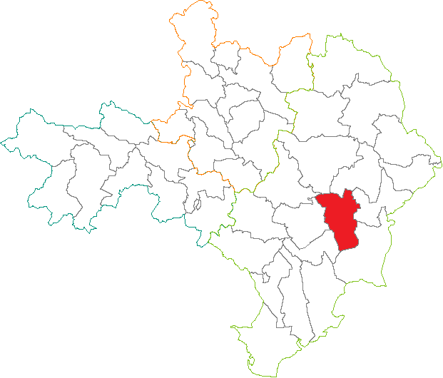 Situation du canton dans le département du Gard (France)